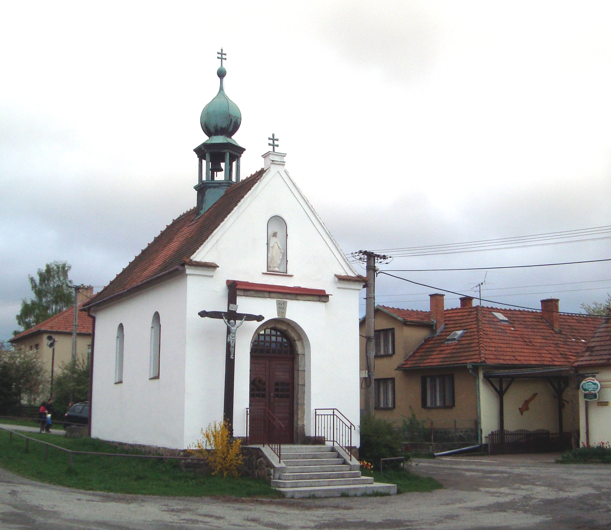 Katov kaple Narození Panny Marie